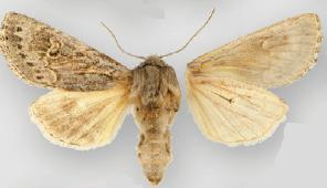 Psammopolia insolens female